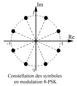 Constellation des symboles en modulation 8-PSK Auteur : Martin Le Bas